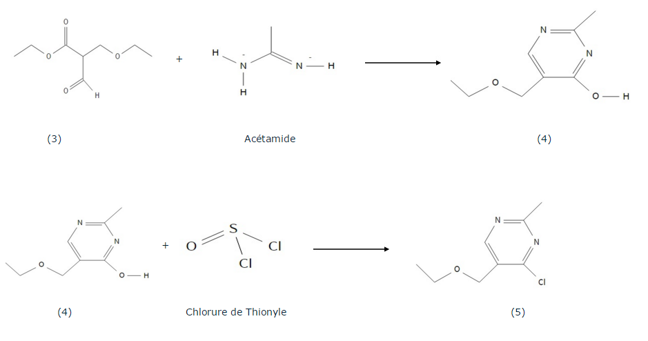 Synthèse suite